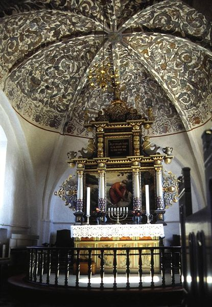 Vinderslev Kirke, Silkeborg Kommune, kor og alter